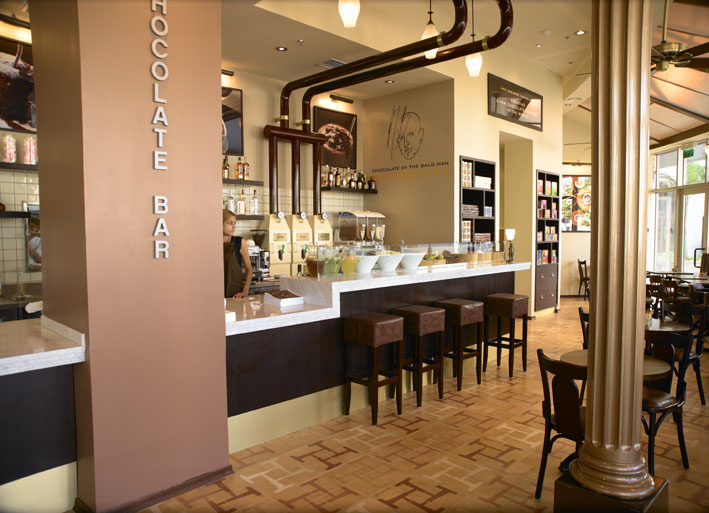 שוקולד בר של מקס ברנר סניף הרצליה